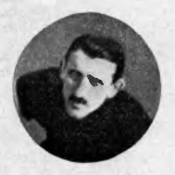 Franciszek Szymczyk (kolarz, srebrny medalista olimpijski 1924)